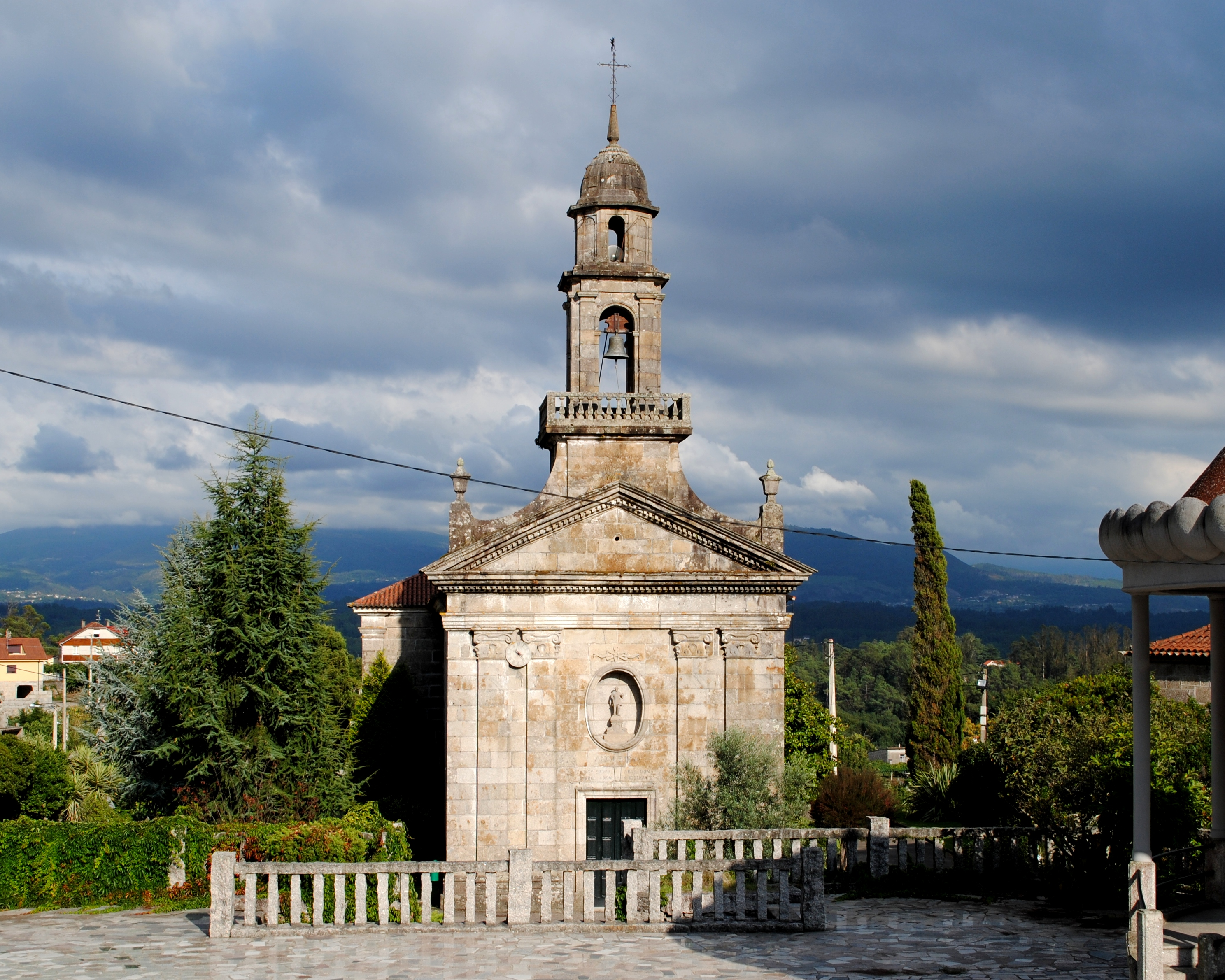 Guláns, Ponteareas